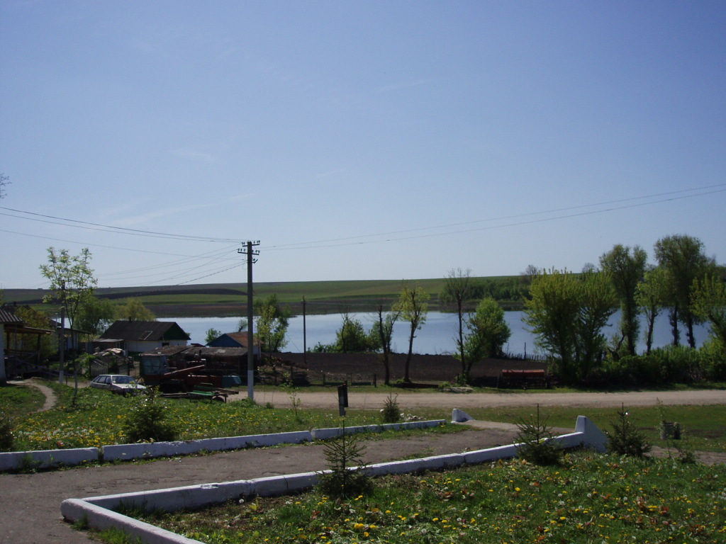 Вид на річку Бовванець: Вид на річку Бовванець